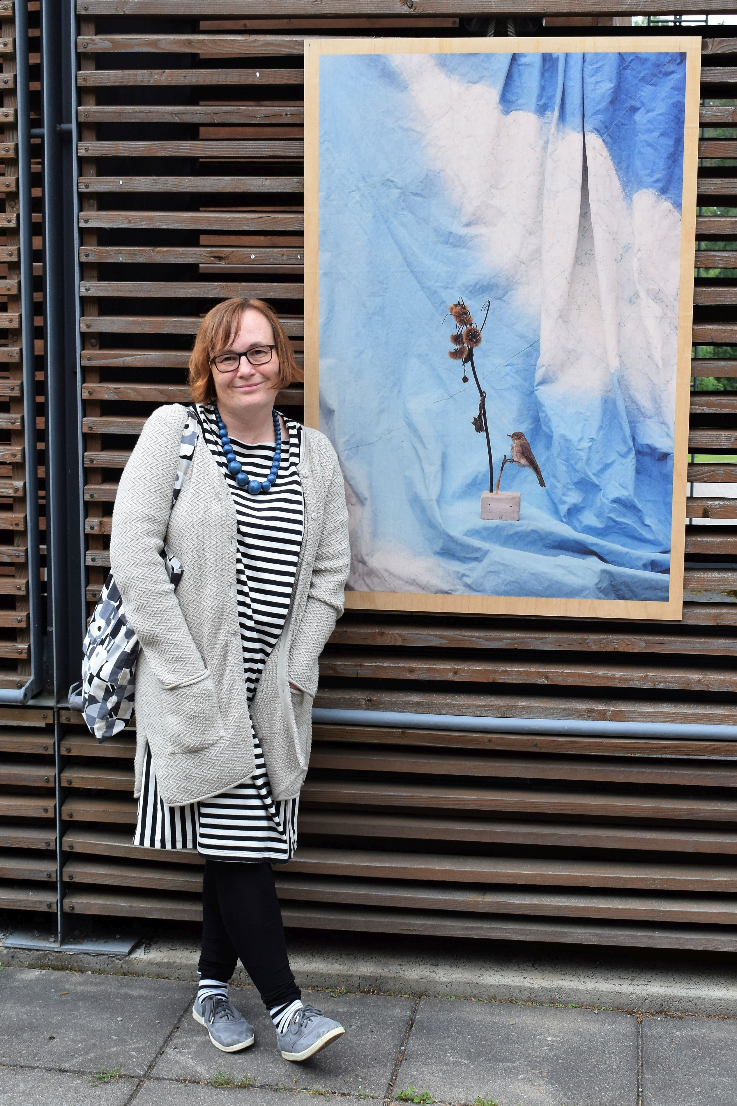 Cornelia Elke Schray im Jahr